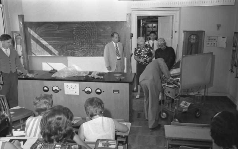 Birmanischer Erzieher, U Ba Lwin besichtigt die Klara Schumann Schule in Bonn